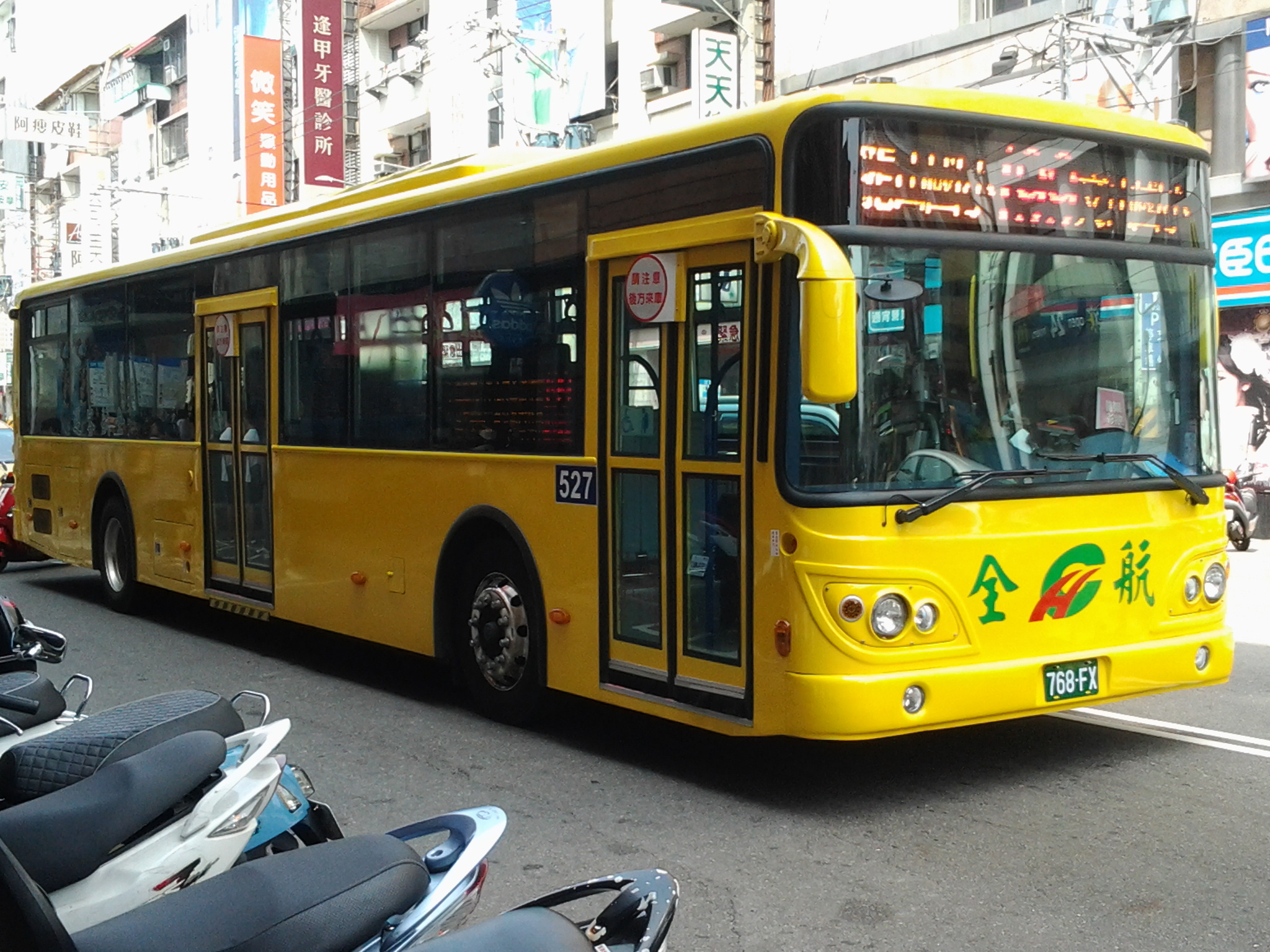 全航客運台中市公車199路